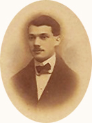 Manuel Inácio Bettencourt Júnior